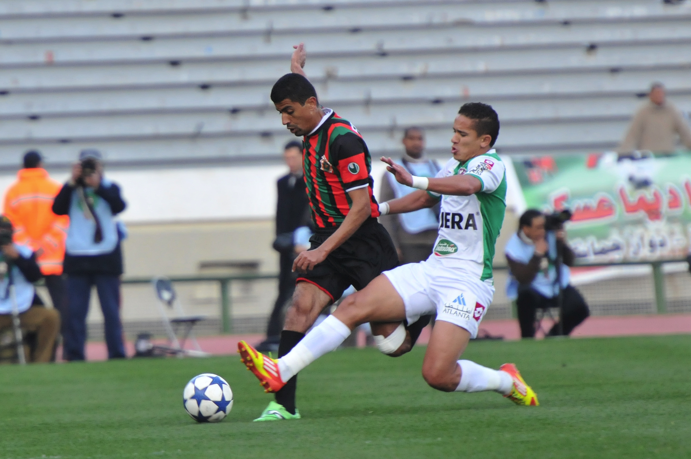 RCA vs FAR